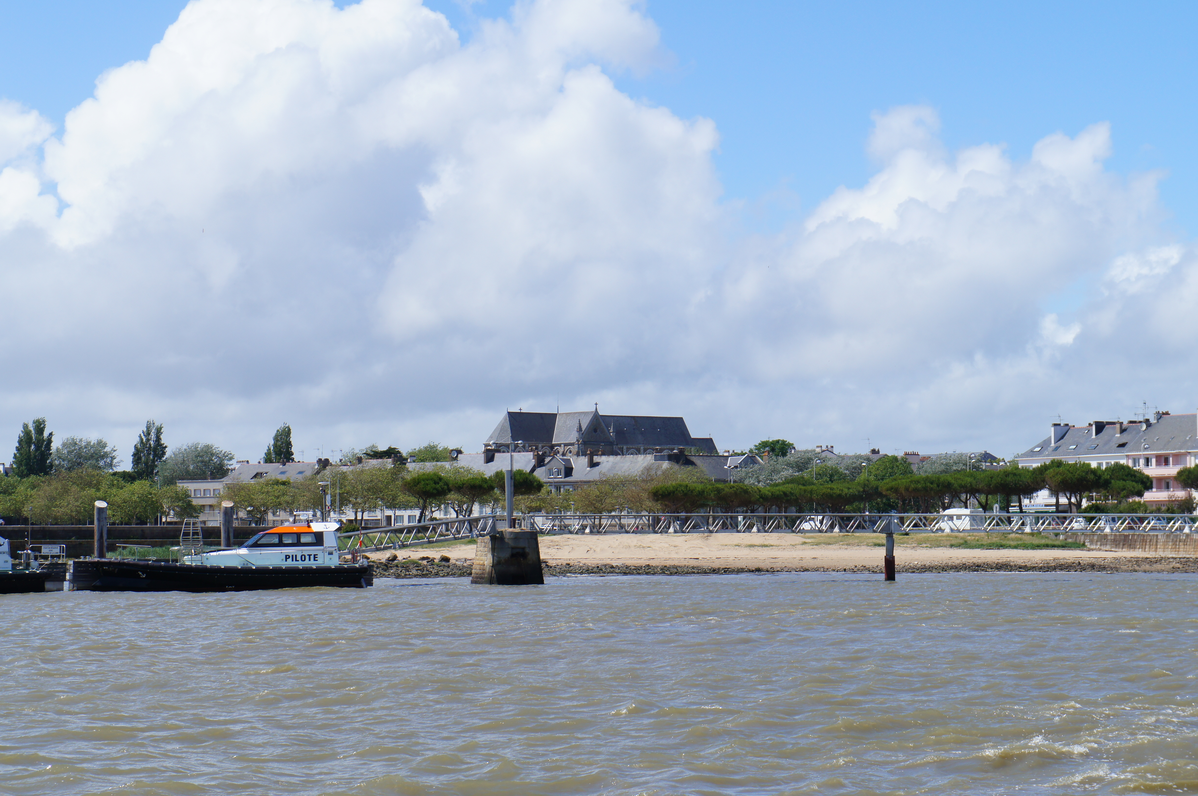 Le port de Saint-Nazaire avec en arrière plan l'église Saint-Nazaire